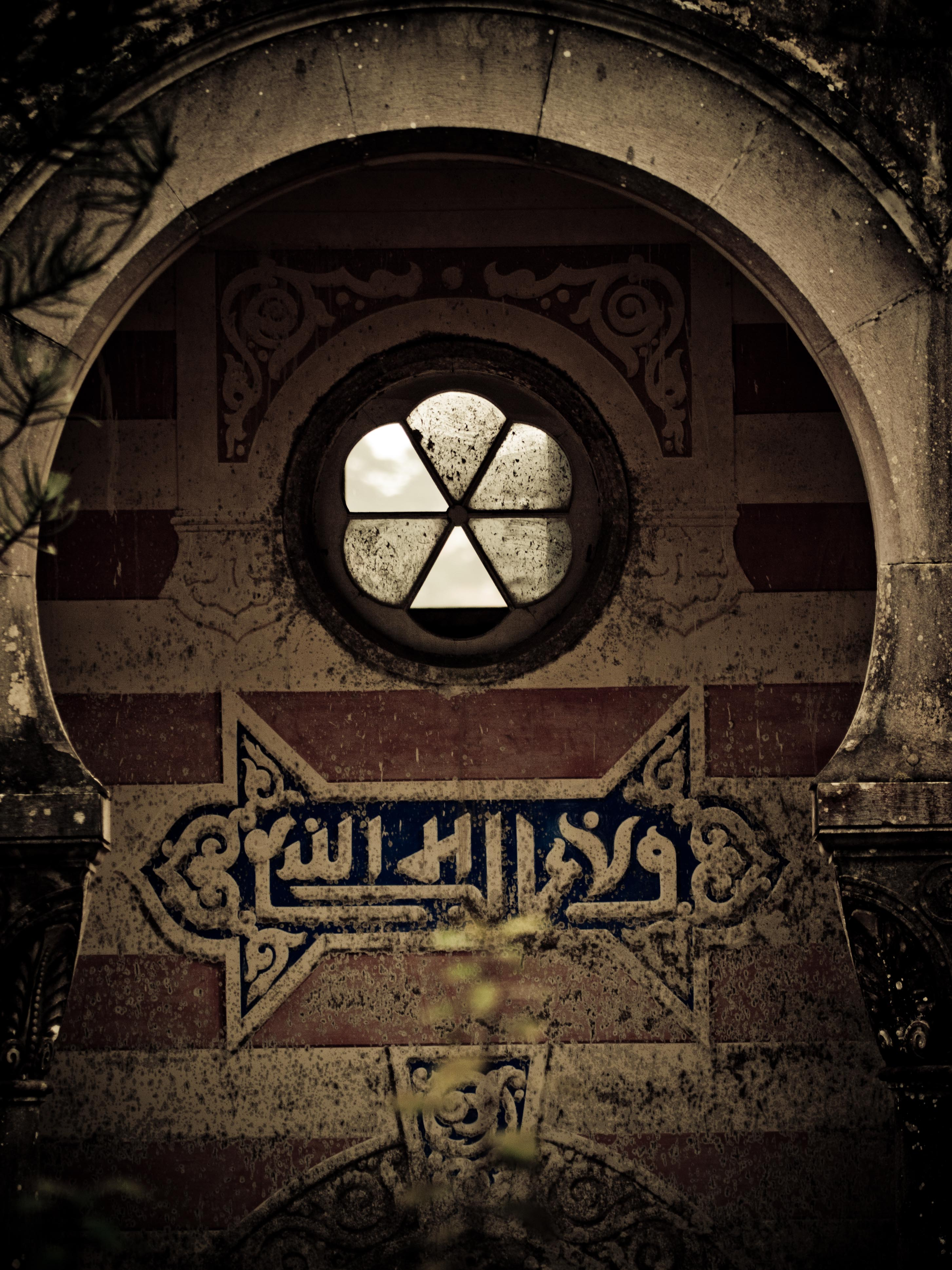 wlm_id: 6666431 Quinta do Relógio - Sintra